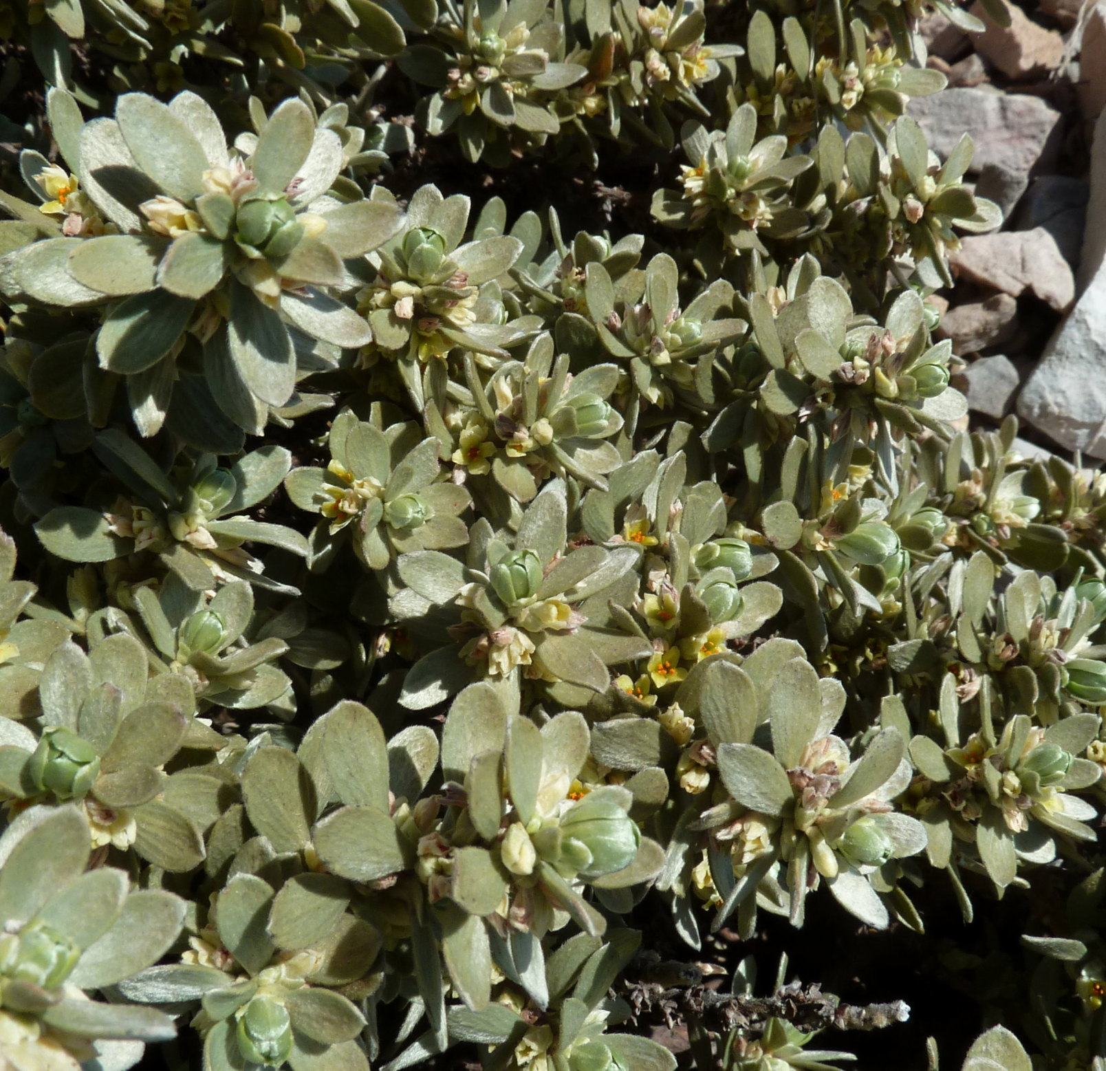 Thymelaea tartonraira à Callelongue (Marseille, France)